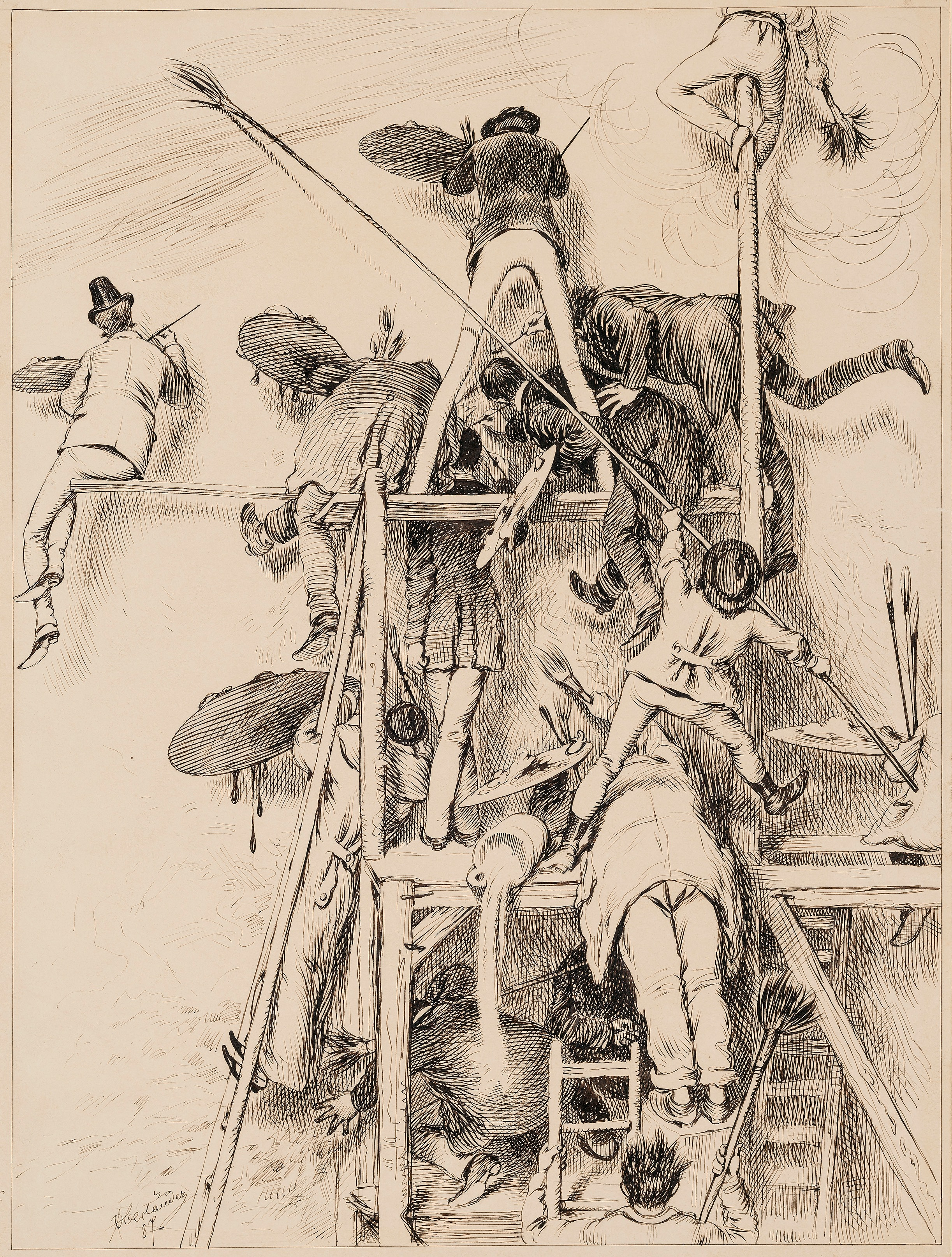 Adolf Oberländer: Das neueste Panoramagemälde Feder in Tusche auf Papier 32,5 x 24,5 cm Links unten signiert und datiert